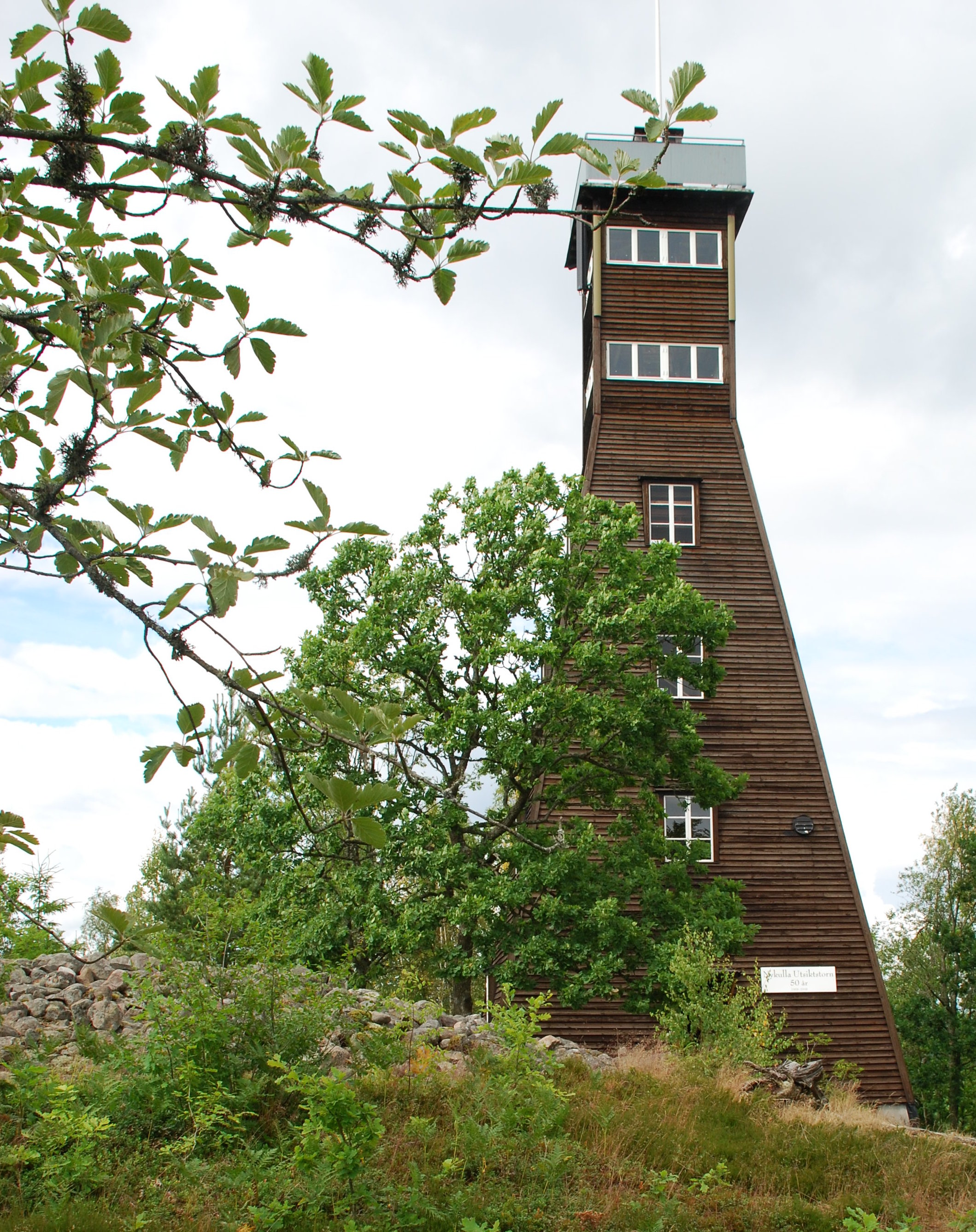 Nykulla utsiktstorn, med bronsåldersgravröse bredvid